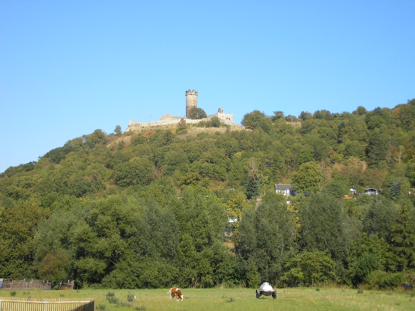 Die Mühlburg in Thüringen.